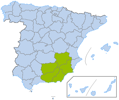 Provincias españolas donde hay corderos segureños. Based in: Image:ProvPont.jpg Source: Designed by JJK. Original picture, designed by Sobreira.